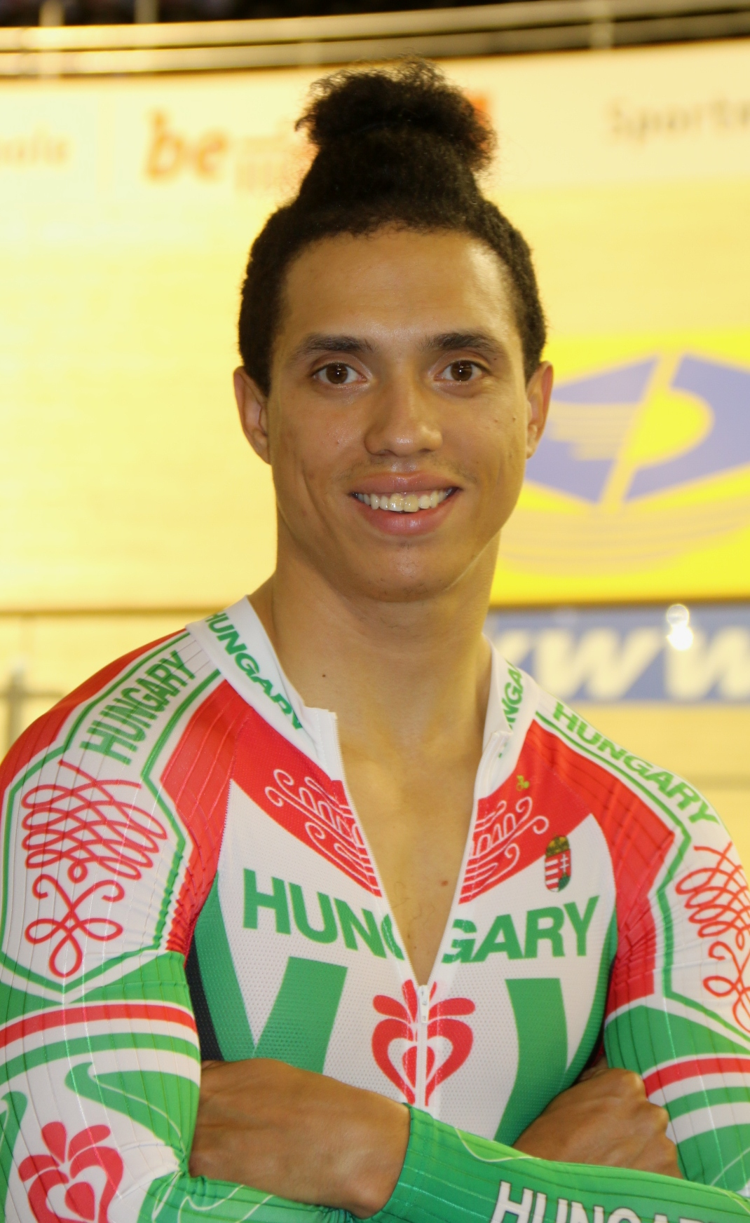 Sándor Szalontay , ungarischer Radsportler